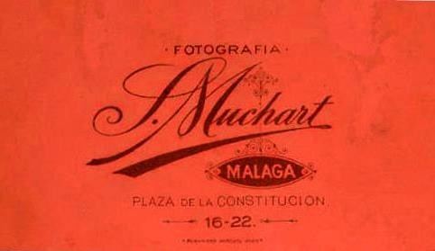 Estudio Fotografía Sabina Muchart (publicidad) Sabina Muchart Collboni, 1858 - 1929 fue una fotógrafa española pionera en ese campo del periodismo de guerra y el arte, considerada hoy en día la primera mujer fotógrafa de guerra de la Historia